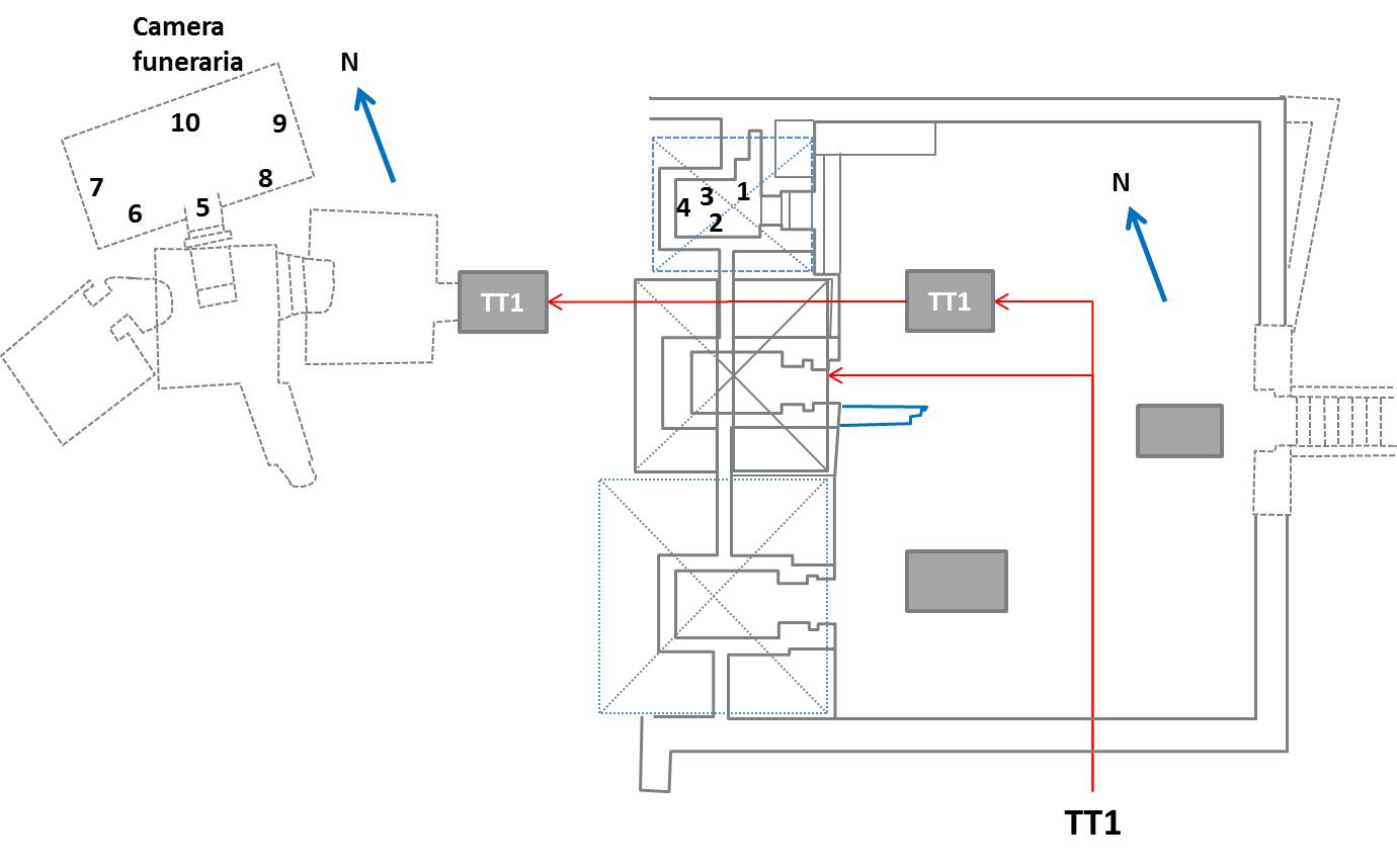 Planimetria schematica della tomba TT1